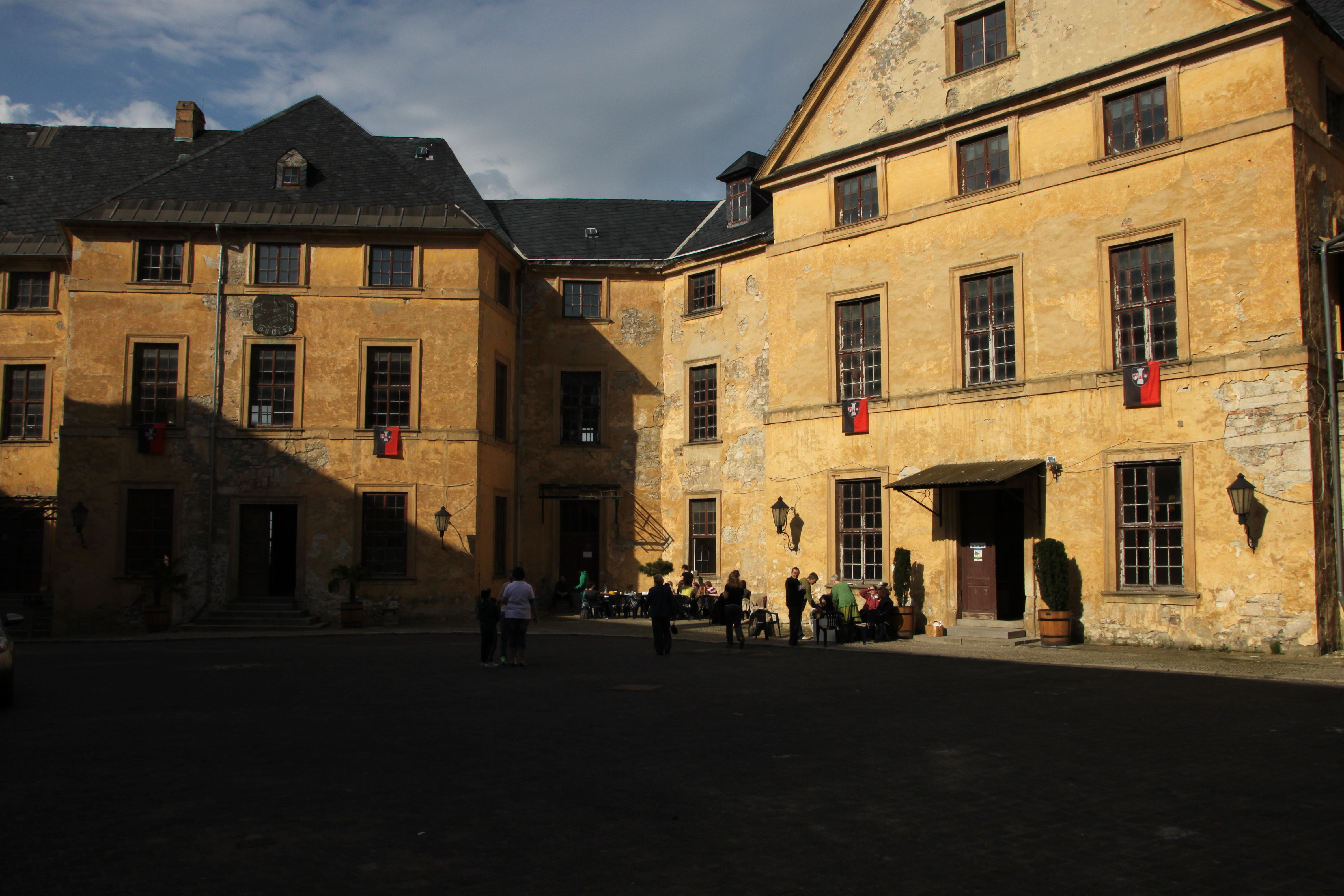 Innenhof des Schloss Blankenburg